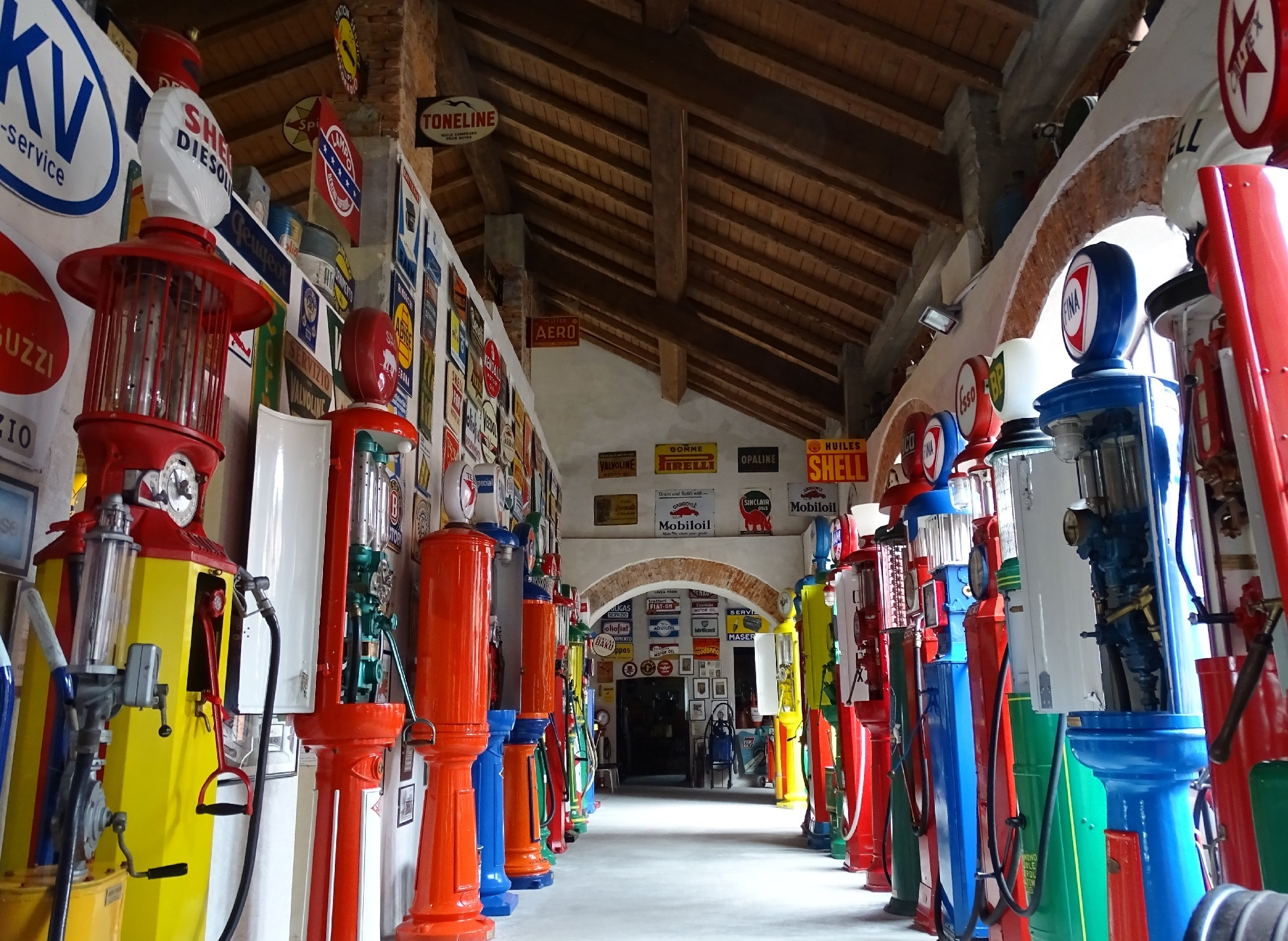 Collezione Museo Fisogni